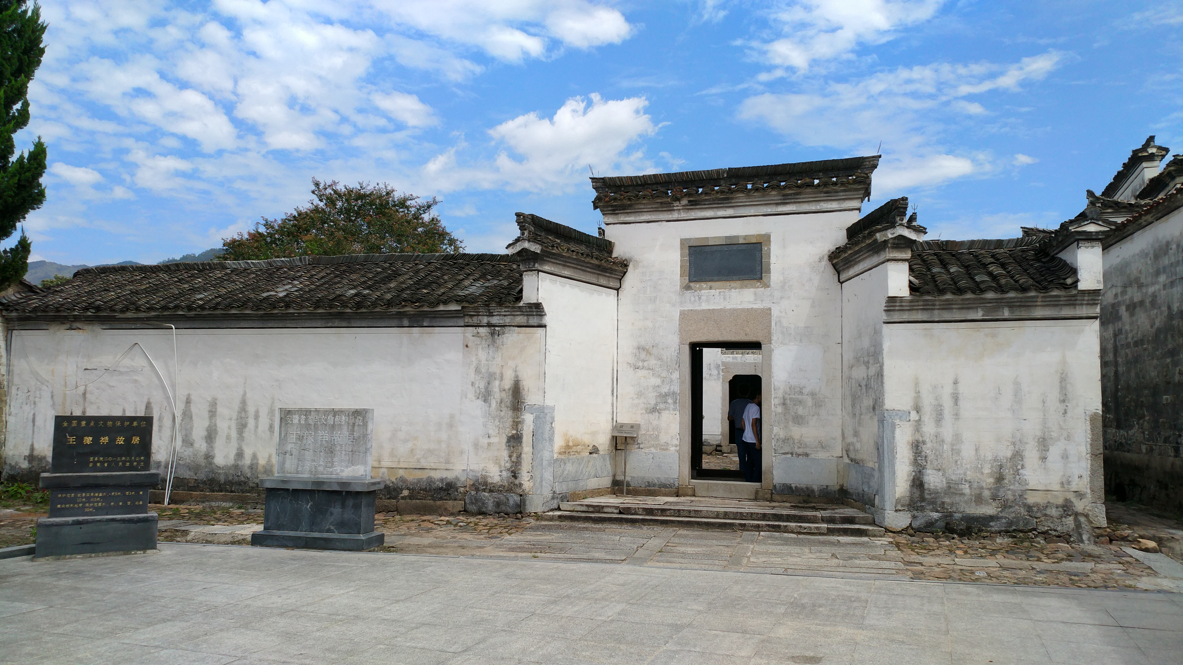 泾县厚岸王稼祥故居